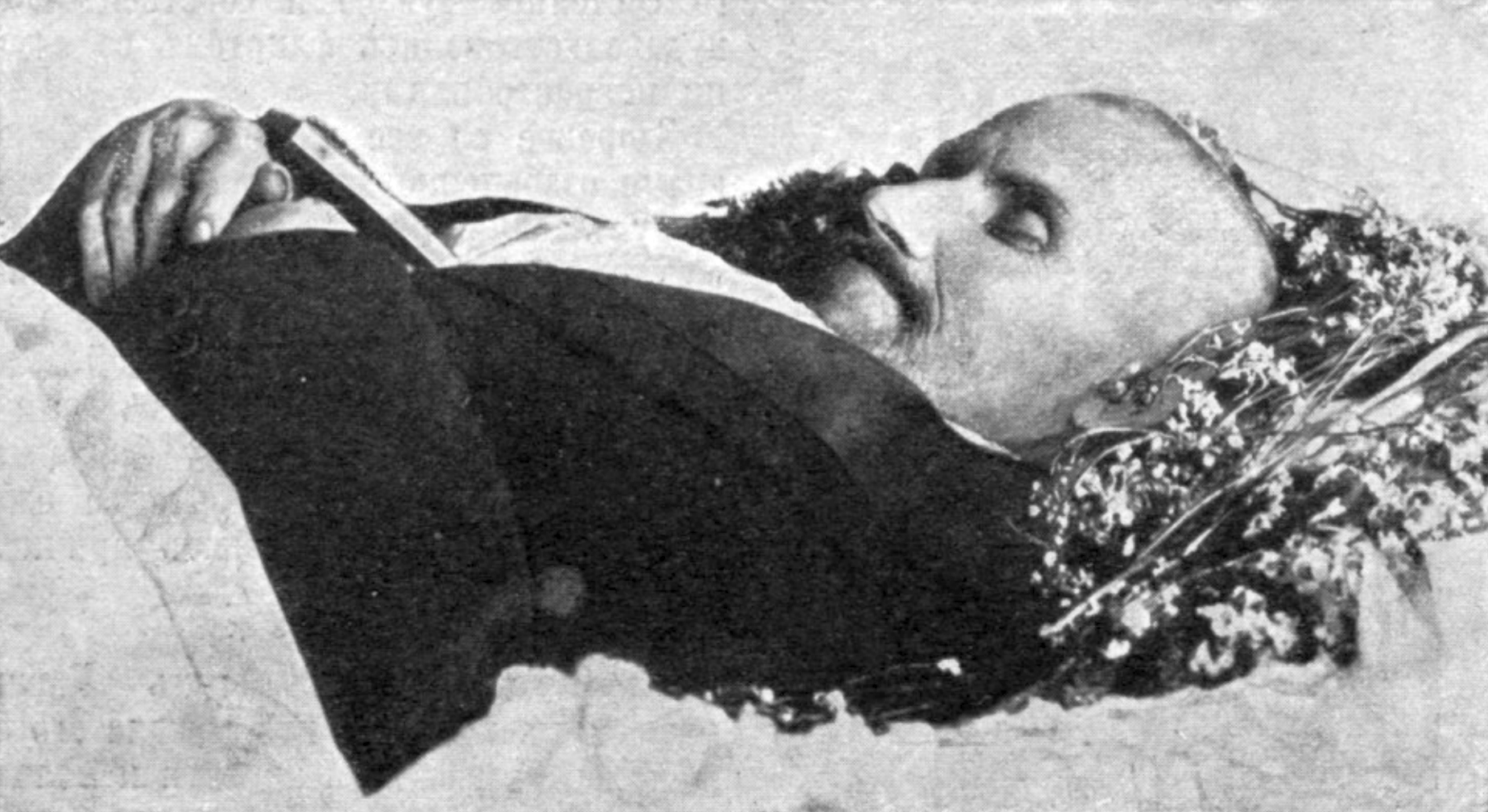 Поэт Константин Михайлович Фофанов на смертном одре